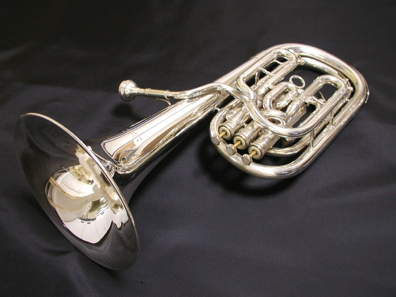 Baritone STERLING 1050GS